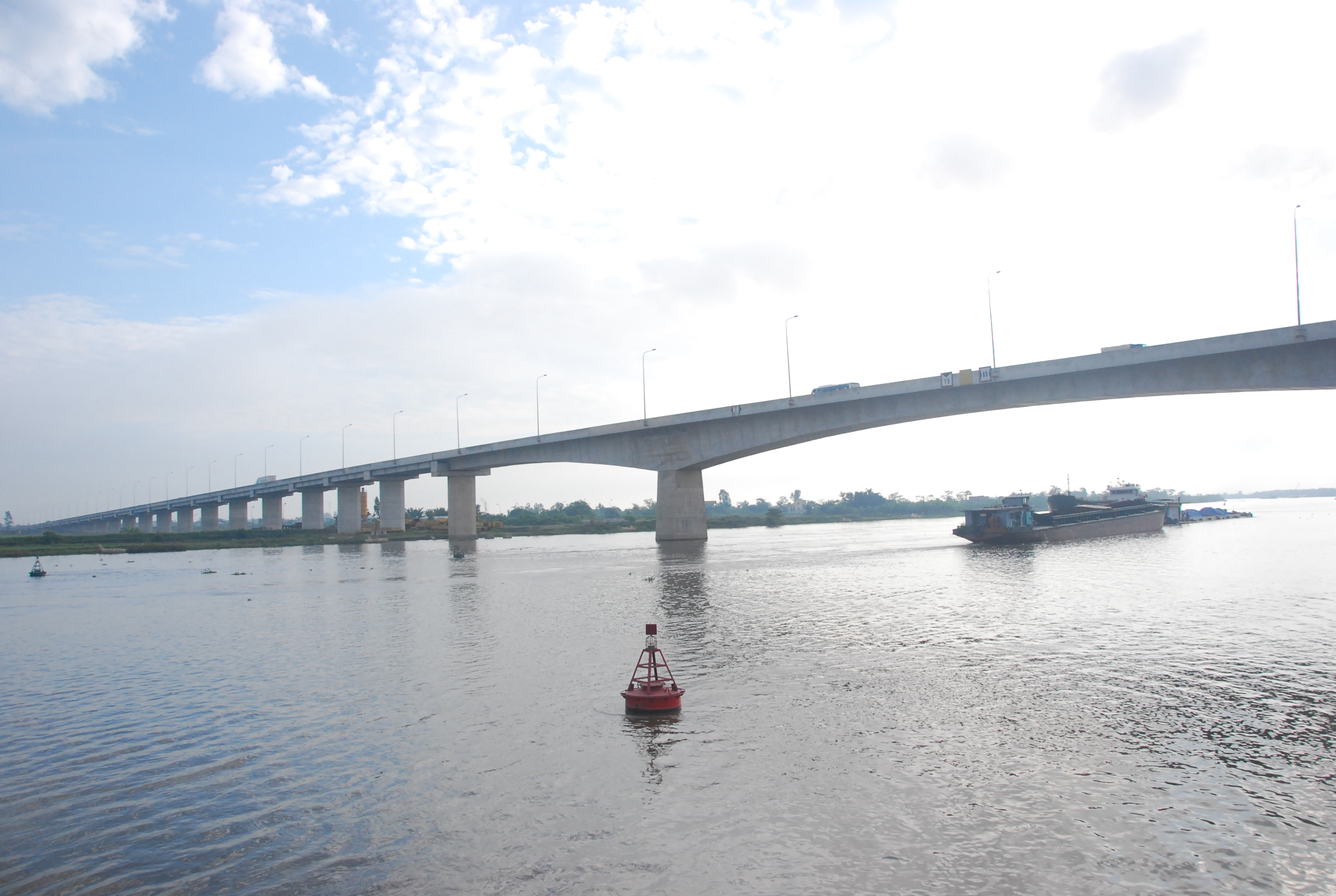 Cầu Nam Bình nối liền Nam Định - Ninh Bình qua sông Đáy trên Đường cao tốc Bắc – Nam (Việt Nam)